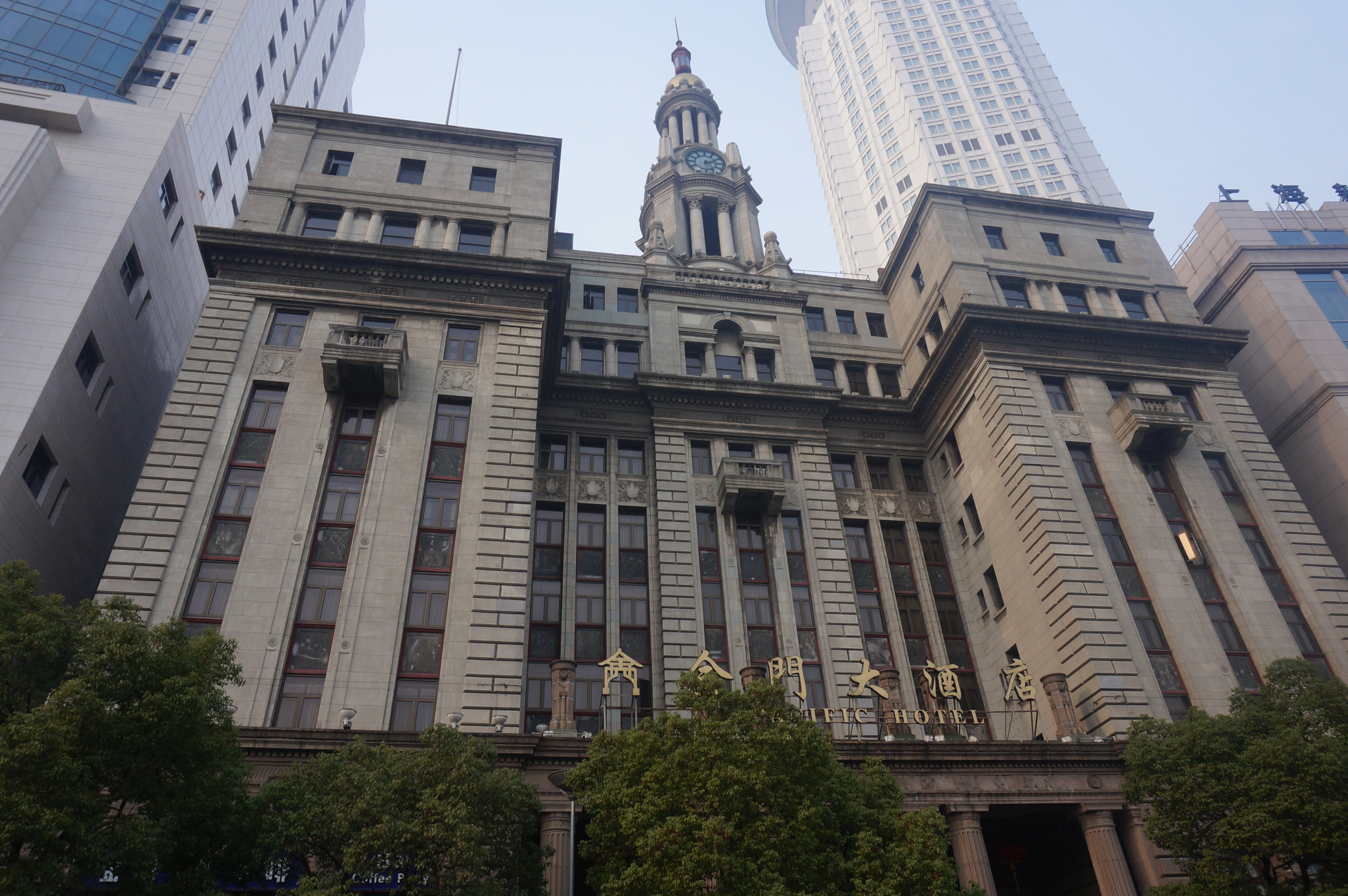 华安大楼正面